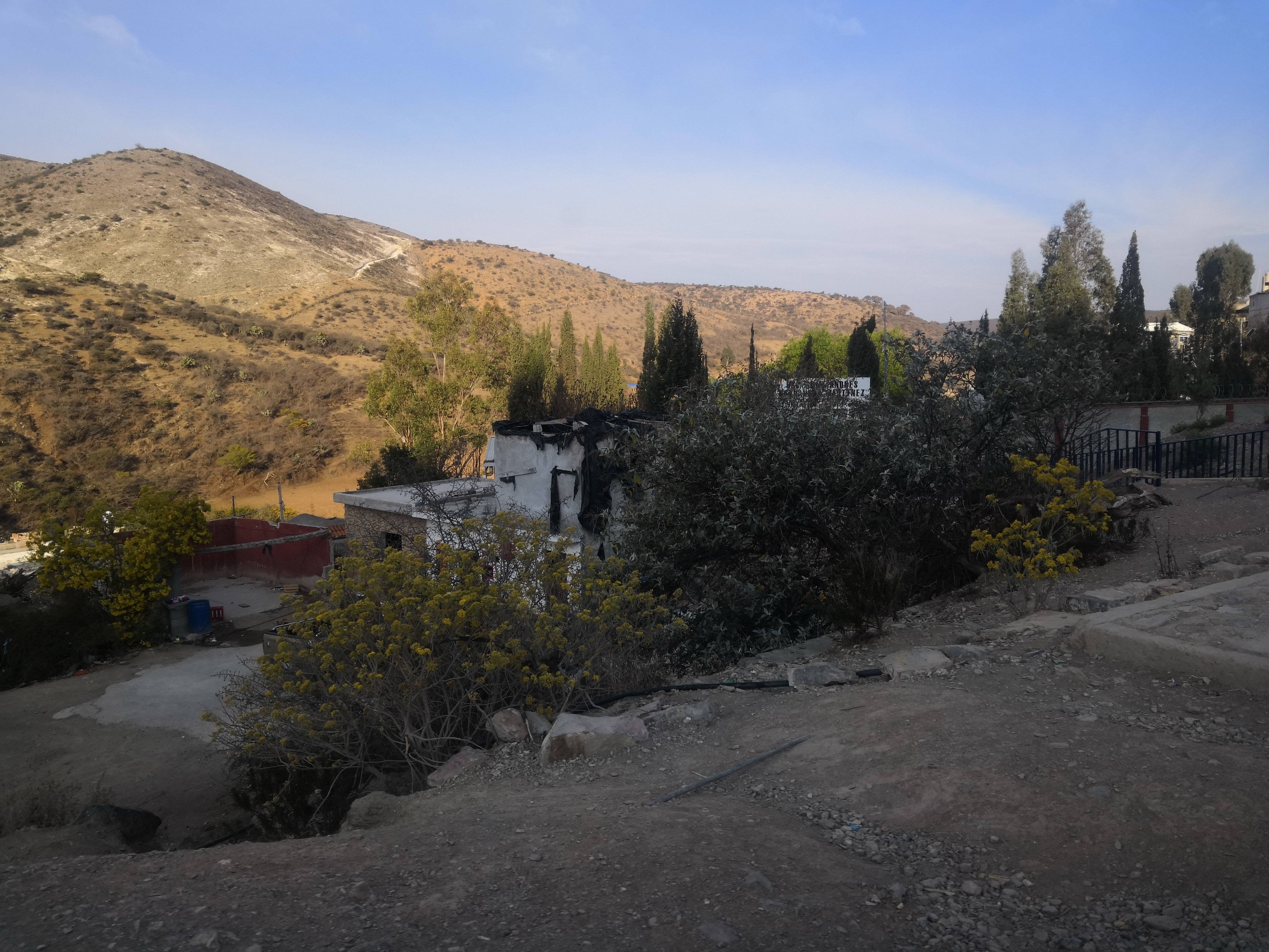 Vista panoramica desde una de las colinas en la comunidad donde se aprecian los cerros circundantes.